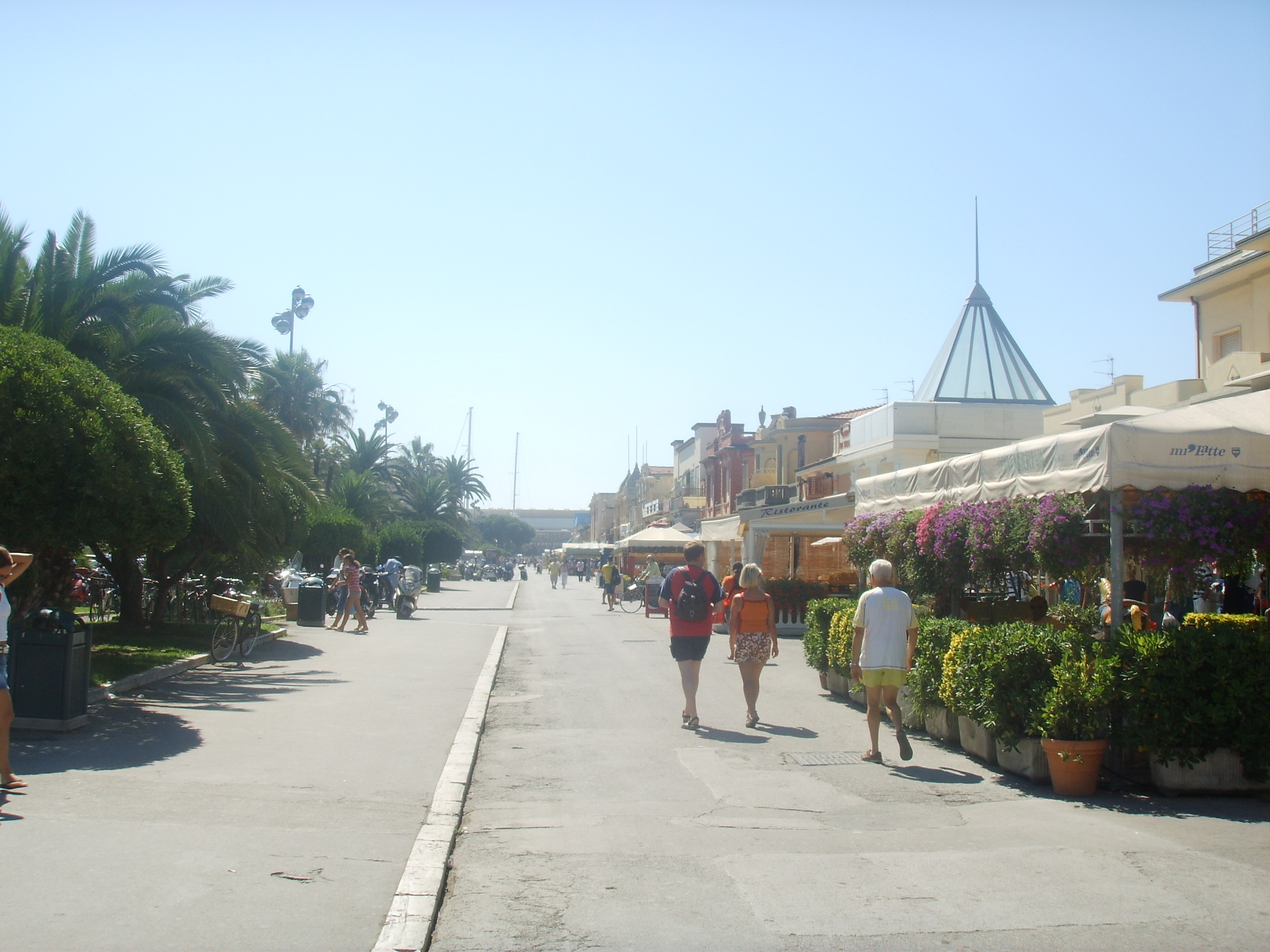 Viareggio, passeggiata_a_mare in Viareggio, italy